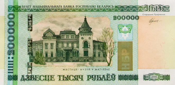 Купюра достоинством 200000 белорусских рублей (лицевая сторона)